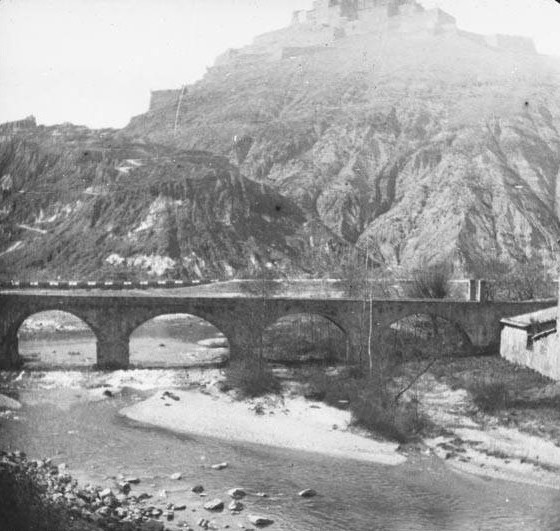 Imatge